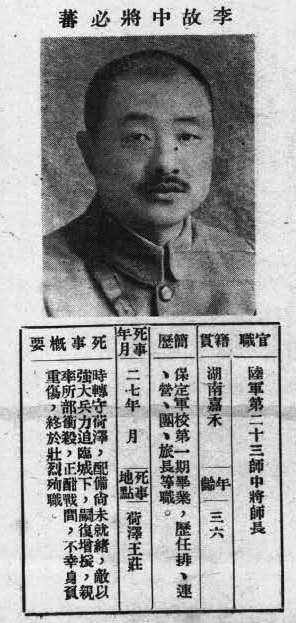 中文（台灣）: 抗戰軍人忠烈錄第一輯中的烈士遺像